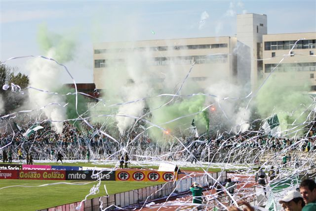 Fotografía de la barra Los Panzers, barra del Club de Fútbol Profesional Santiago Wanderers de Valparaíso.